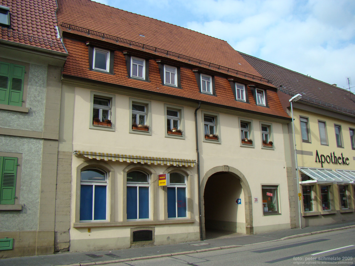 Historisches Gebäude Brettener Straße 38 in Eppingen